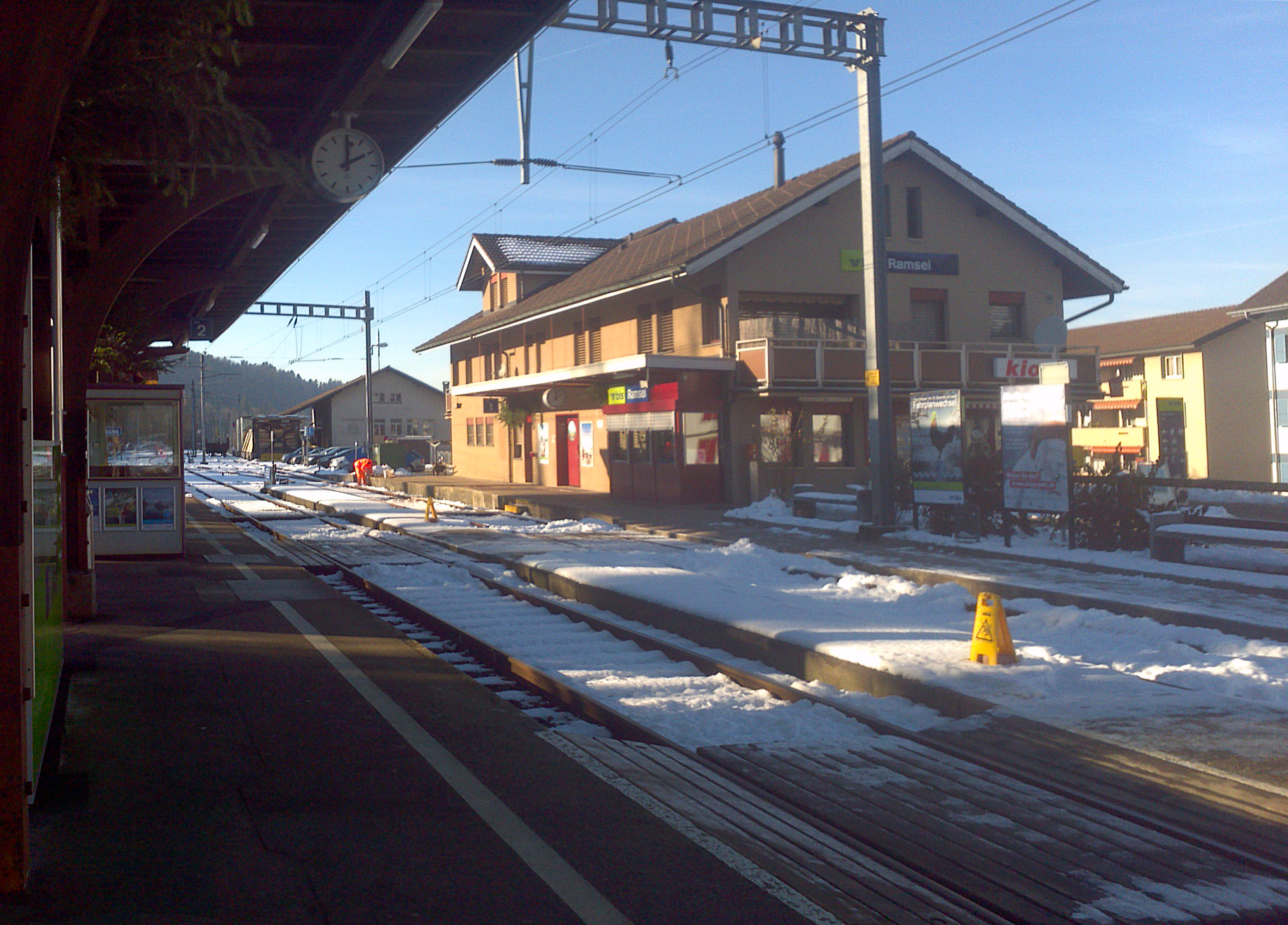 Bahnhof Ramsei, BE